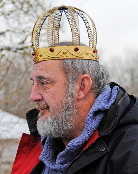 Kirill I XX kroonimisjuubel 2012.a.